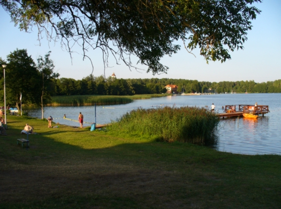 Kąpielisko u nasady półwyspu Kal